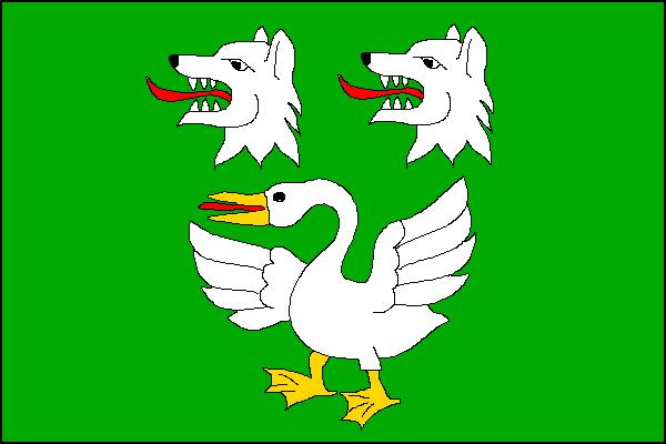 Vlajka obce Uhřice (okres Kroměříž)